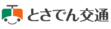 とさでん交通のロゴ